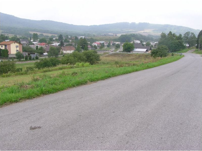 Celkový pohľad